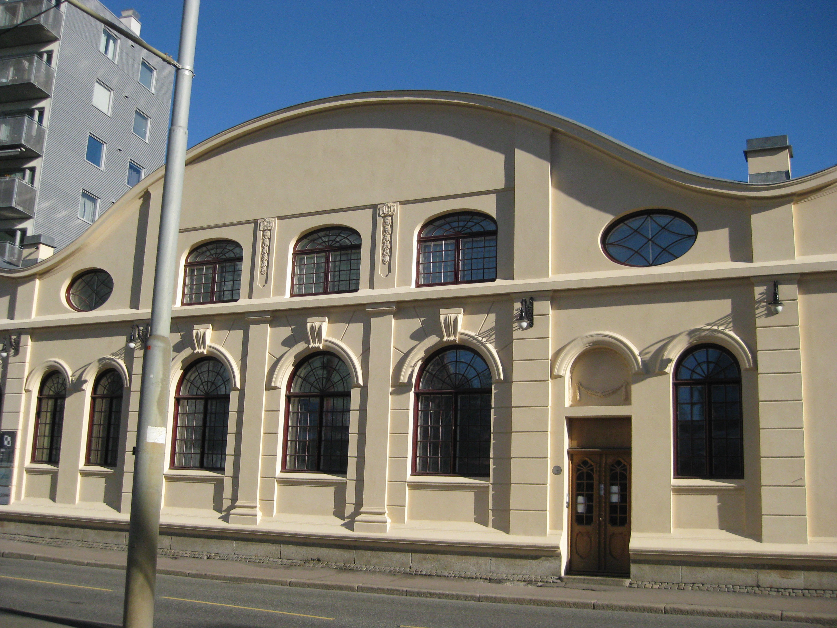 Trelastlageret med kontorbygning i Schweigaards gate 28. Oppført i 1912. Tegnet av arkitekt Harald Kaas.